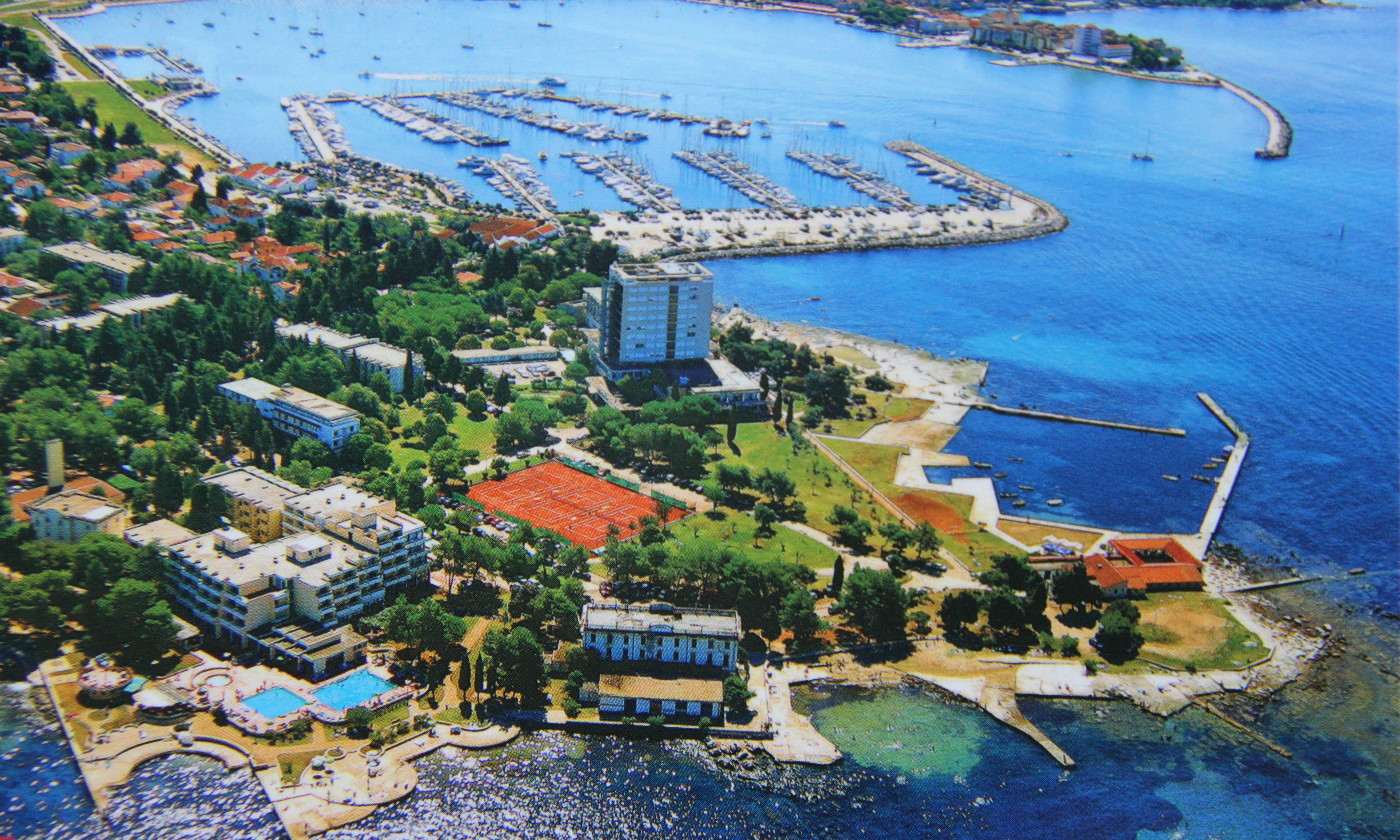 Foto aerea di Umago, in Istria